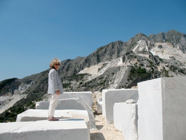 Amalia Del Ponte alle Cave di Carrara